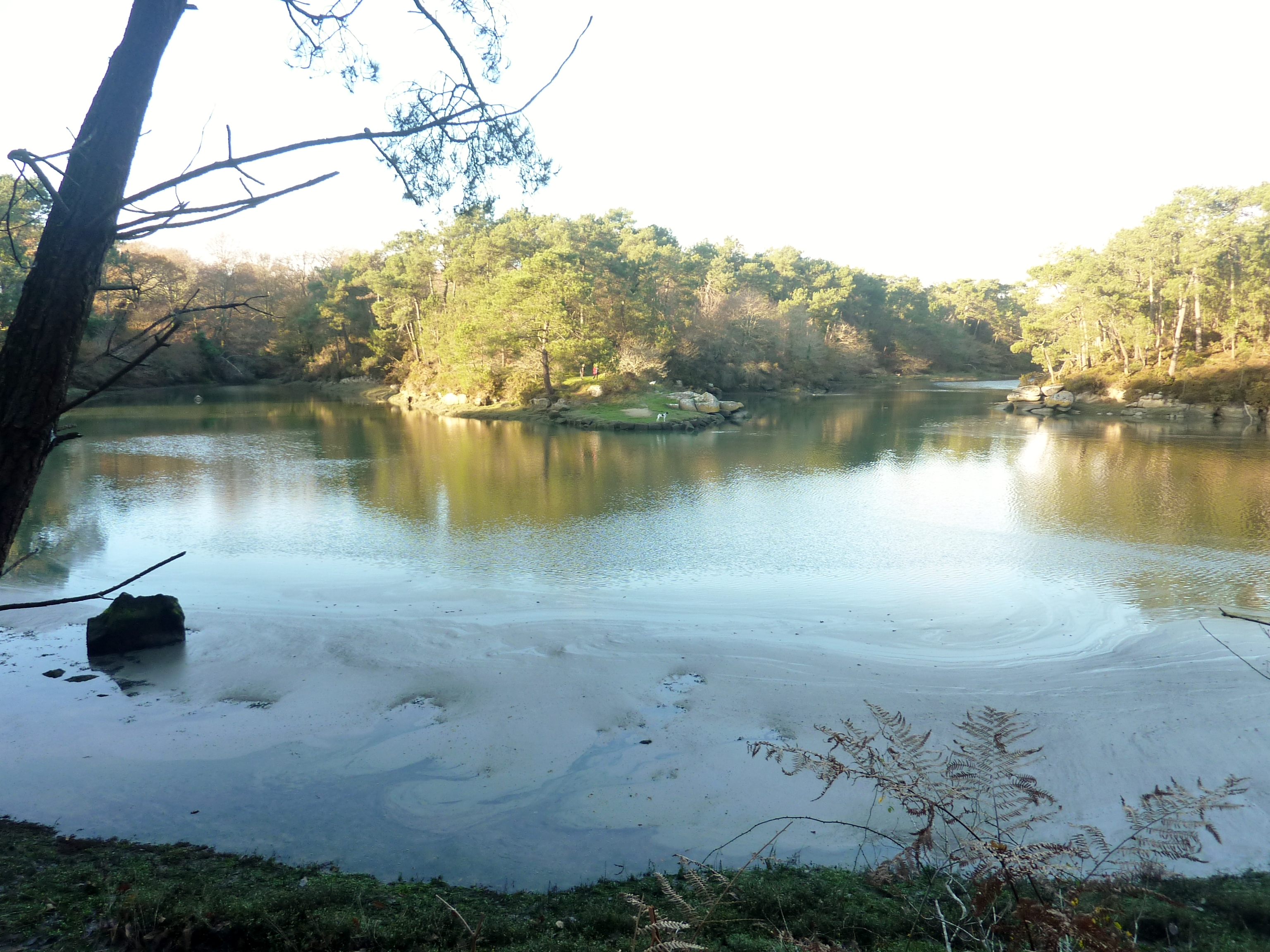 Névez : sur la presqu'île de confluence au centre de la photo, un des quais sommaires servant à l'exportation par chalands des blocs de granite de la carrière de Kérochet (Anse de Kérochet, fond de l'Anse de Poulguin, ria de l'Aven)